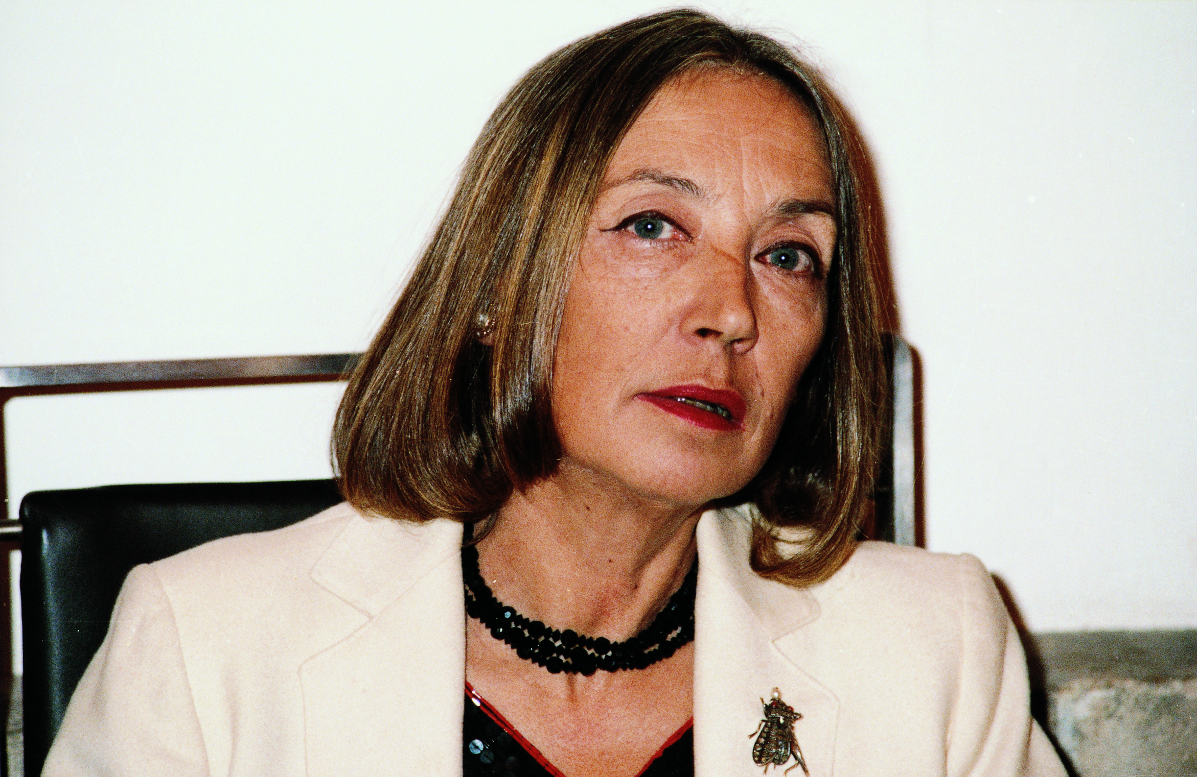 Foto scattata a Colonia nel 1987